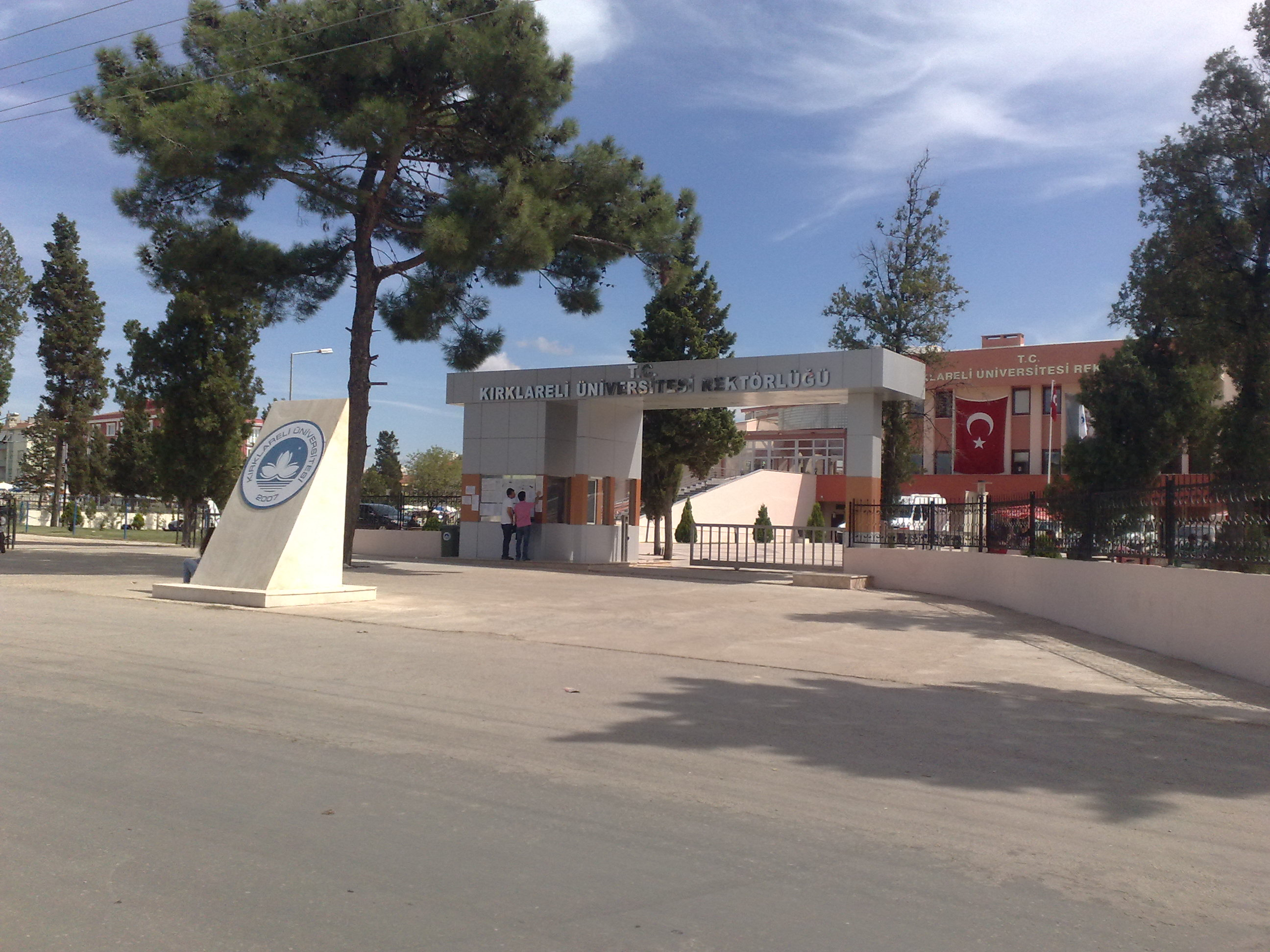 Kırklareli Üniversitesi Rektörlüğü.